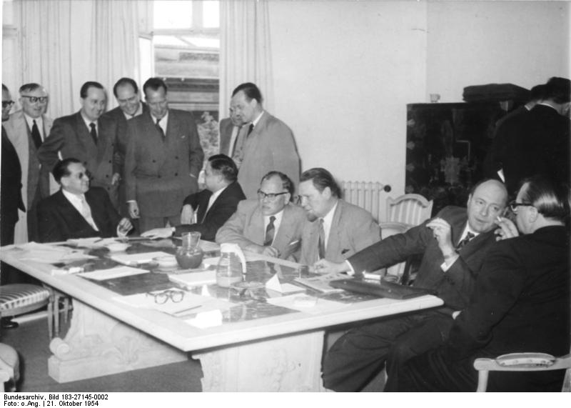 Adenauer handelt in Paris entgegen den nationalen Interessen des deutschen Volkes (Frankreich). Durch die Unterzeichnung der Abmachungen mit den Westmächten über die Remilitarisierung Westdeutschlands hat Adenauer den Rüstungsindustriellen und Revanchisten Westdeutschlands den Weg geebnet und die Wiedervereinigung Deutschlands zu einer Angelegenheit der Westmächte erklärt. Besondere Bedeutung kommt in diesem Augenblick dem neuen Vorschlag der Sowjetunion zu, der eine Außenministerkonferenz über die friedliche Wiedervereinigung Deutschlands, gesamtdeutsche freie Wahlen und den Abzug aller Besatzungstruppen aus Deutschland vorschlägt. U. B. z.: Am 21.10.1954 zitierte Adenauer die Chefs der Bonner Regierungskoalition in die Räume der Diplomatischen Mission Westdeutschlands in Paris. Von links nach rechts (am Tisch): Dehler, Strauß, Gerstenmeier, von Meerkatz, Haasler und von Brentano